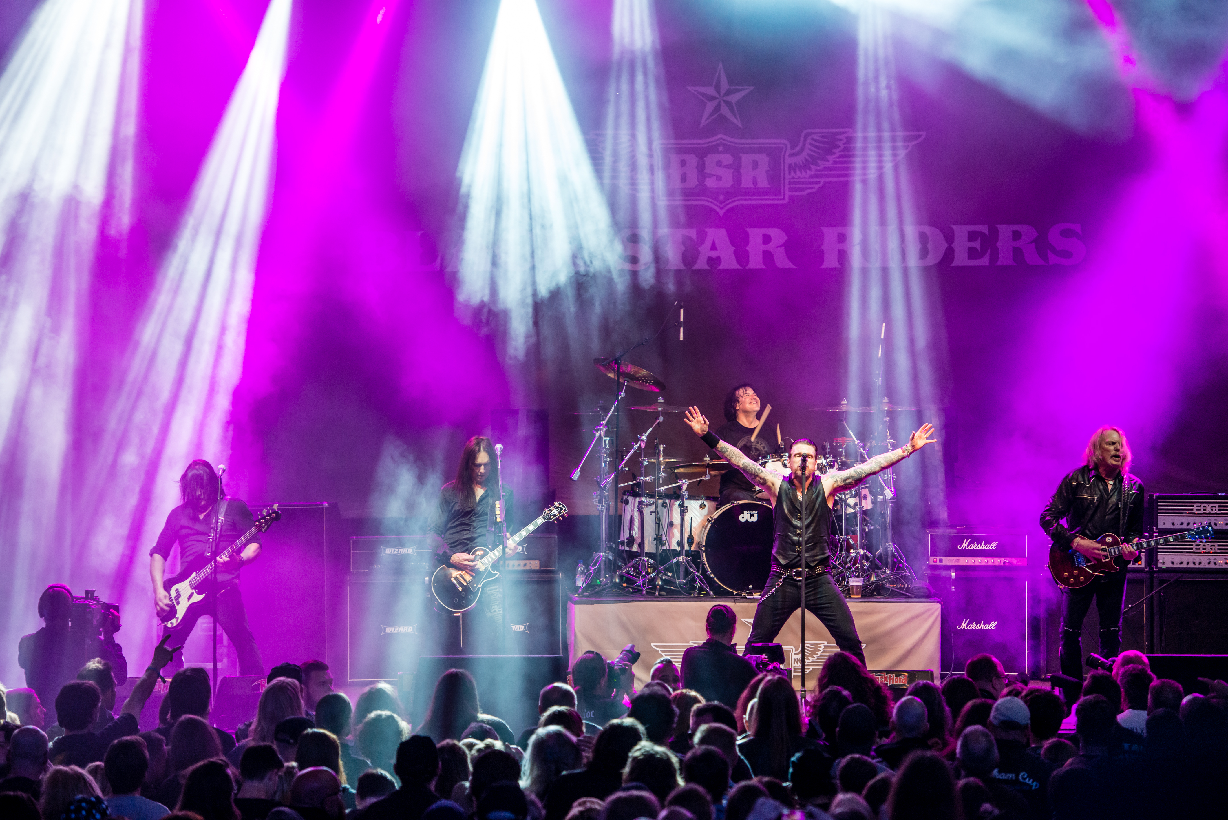 'Rock Hard Festival 2015; Gelsenkirchen Amphitheater': 'Black Star Riders'